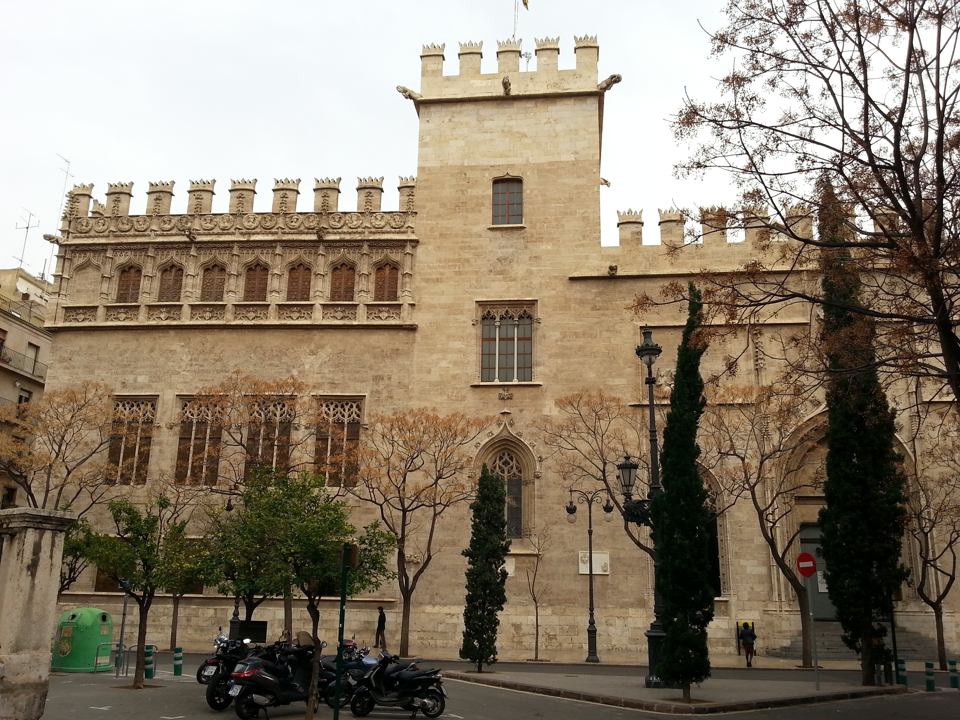 Llotja de la Seda de València.